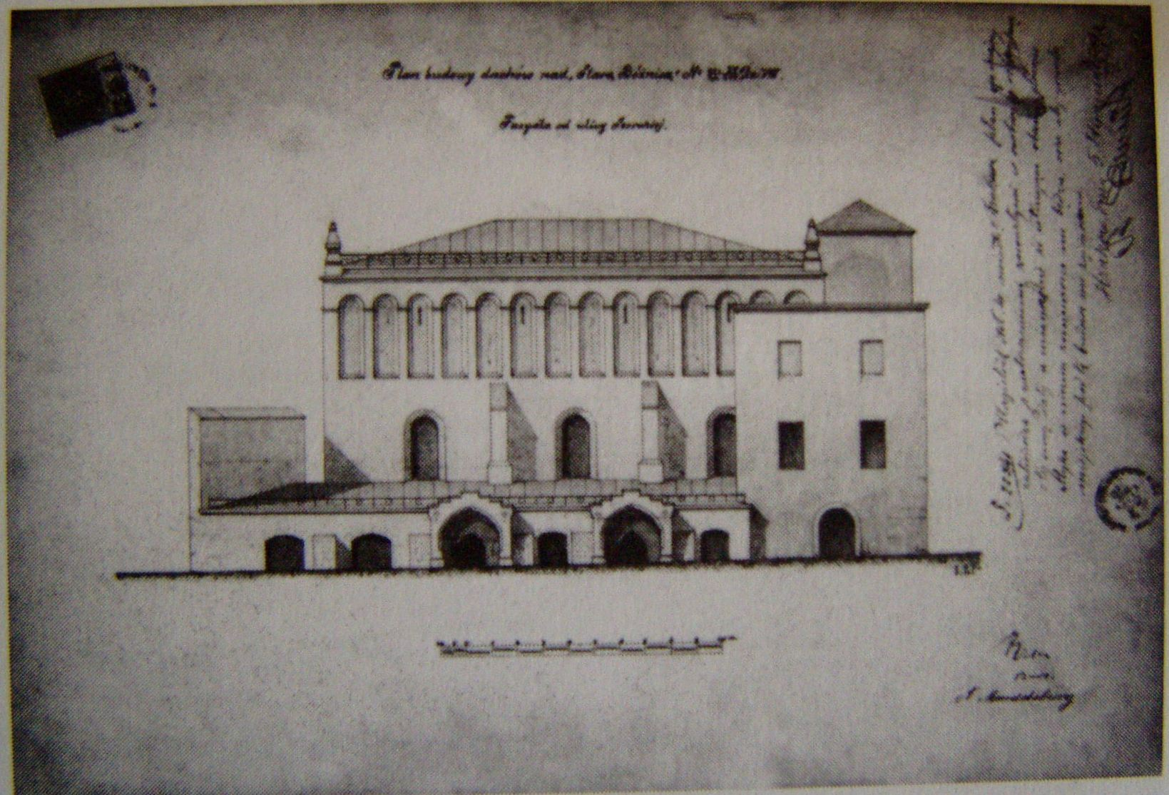 Projekt przebudowy Starej Synagogi w Krakowie